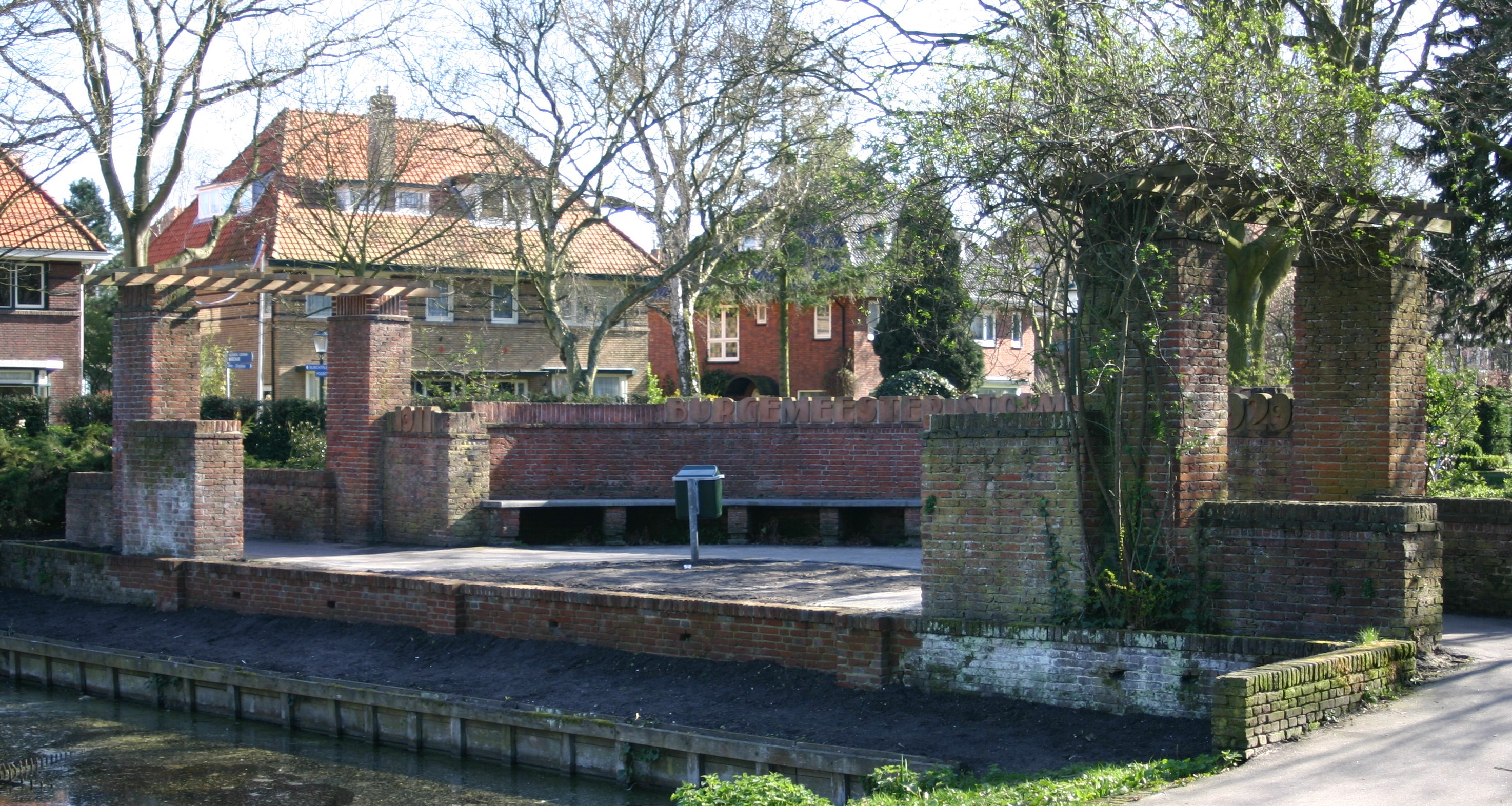 rijksmonumentnummer 524534.